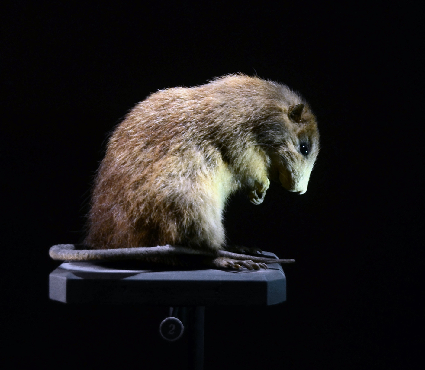 Rat pilori de Sainte-Lucie (Megalomys luciae ), espèce éteinte. Specimen naturalisé exposé dans la Grande Galerie de l'Evolution au Museum National d'Histoire Naturelle, à Paris.